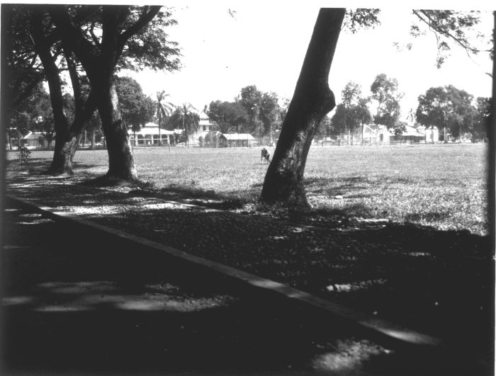 Foto. De aloen-aloen te Bondowoso op Oost-Java